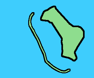 Foarm fan de Tsjûkepôle.